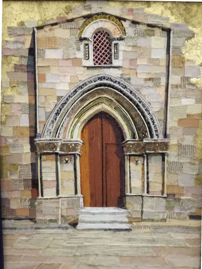 Opera di Gisella Giovenco, tarsie di seta